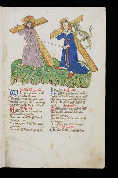 Cod. Eins. 710, Christus zieht die minnende Seele mit sich, F. 1r